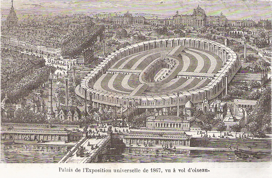 Bâtiment ovoïde de l'exposition universelle de 1867, sur le Champs-de-Mars.